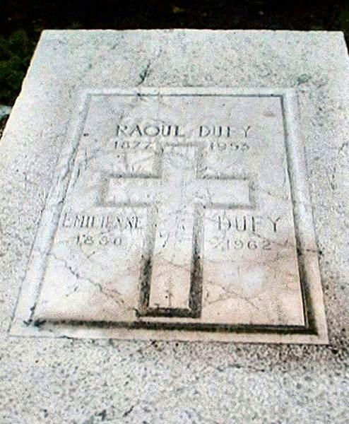 Nice - Quartiers de Nice Quartier de Nice-Cimiez Cimetière de Cimiez La tombe de Raoul DUFFY